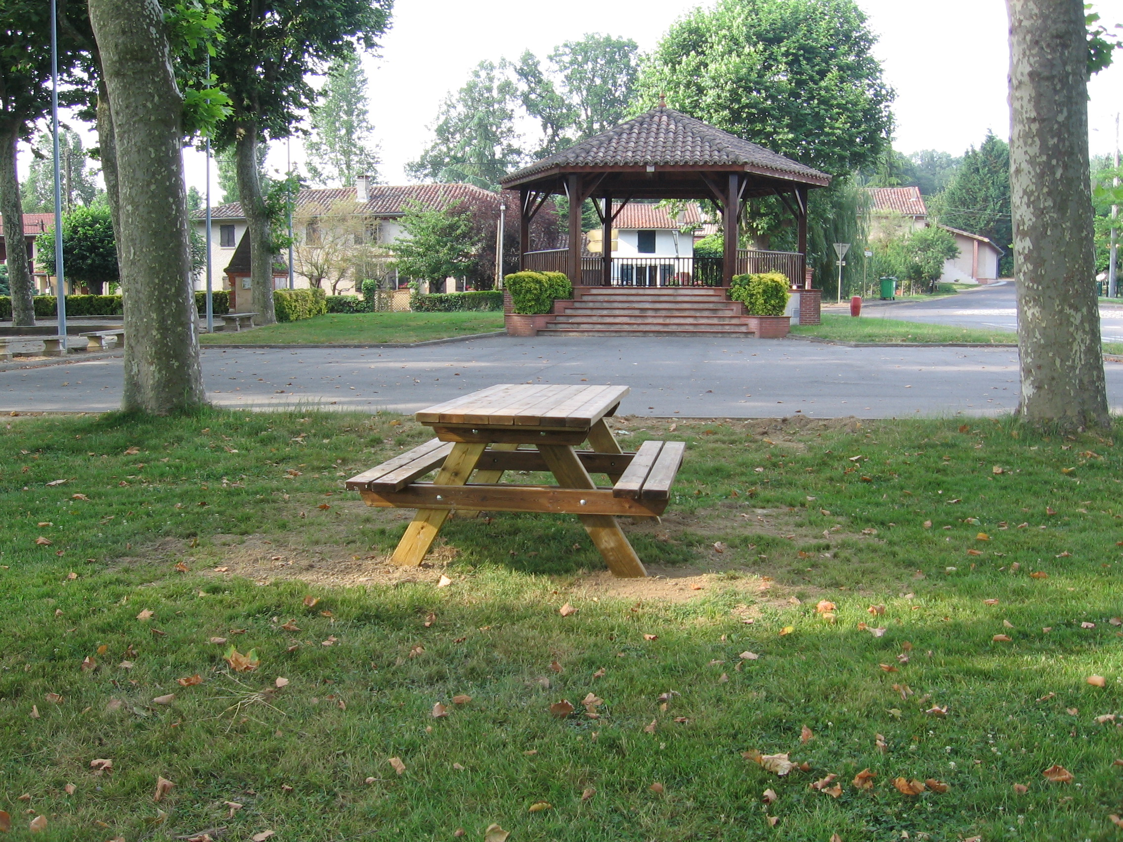 Le kiosque.